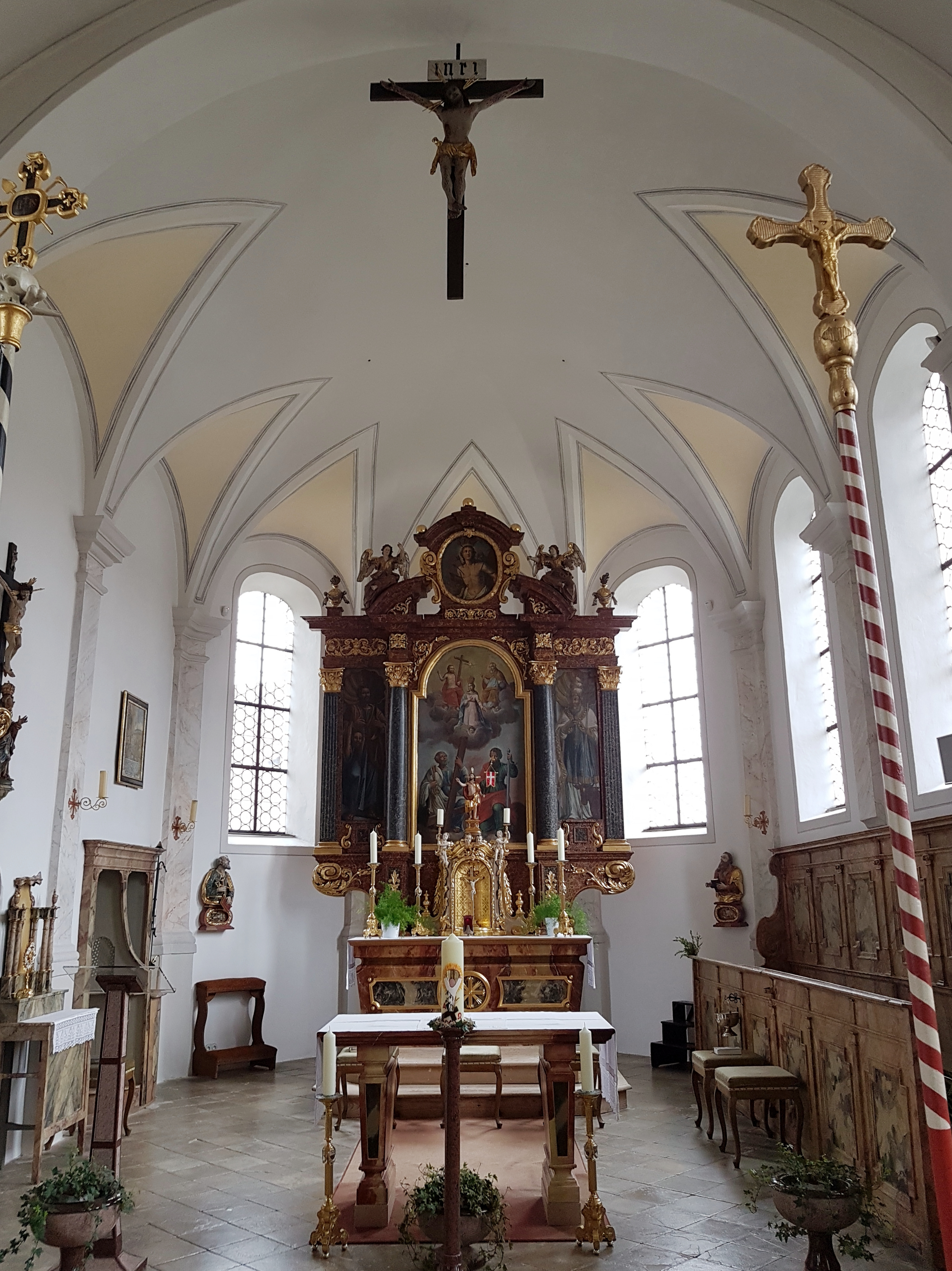 Sankt Peter und Paul (Faistenhaar), Chor mit Hochaltar.